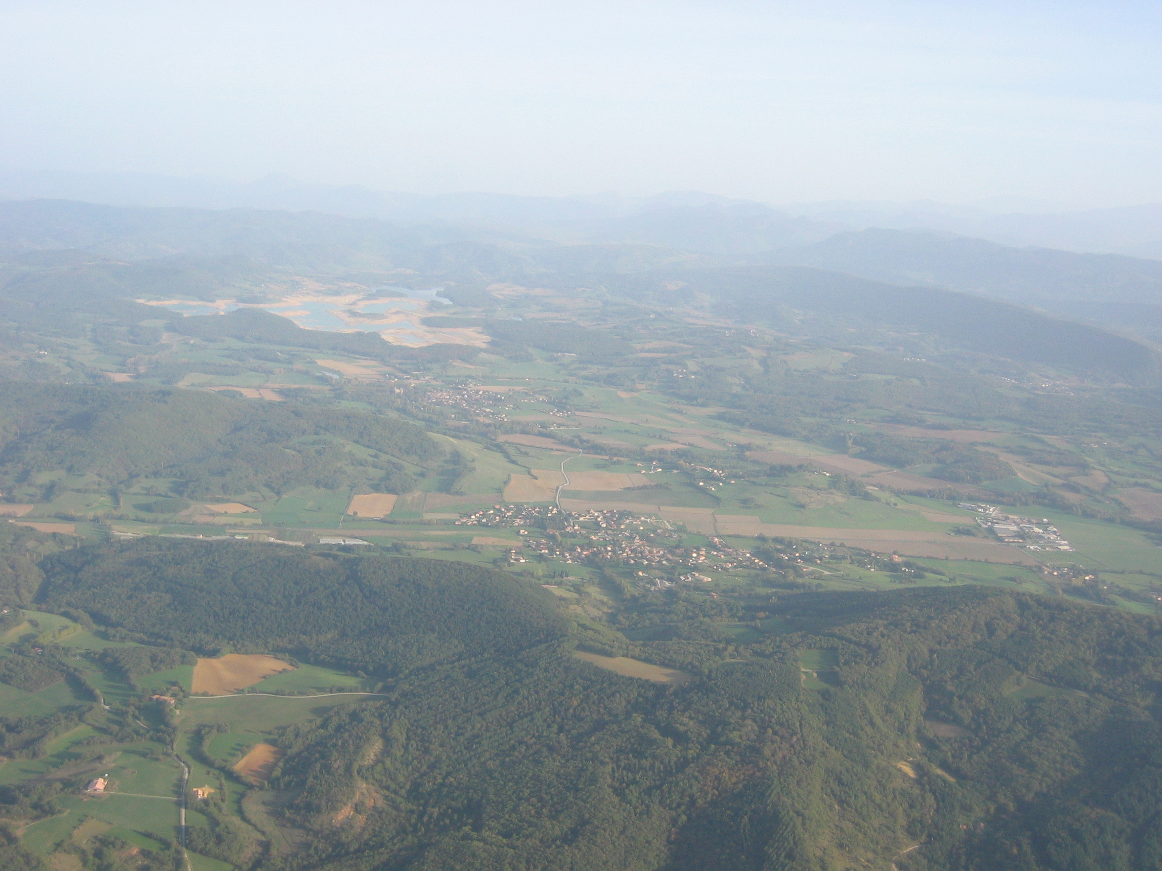 Aigues-Vives (Ariège), Léran & Barrage de Montbel